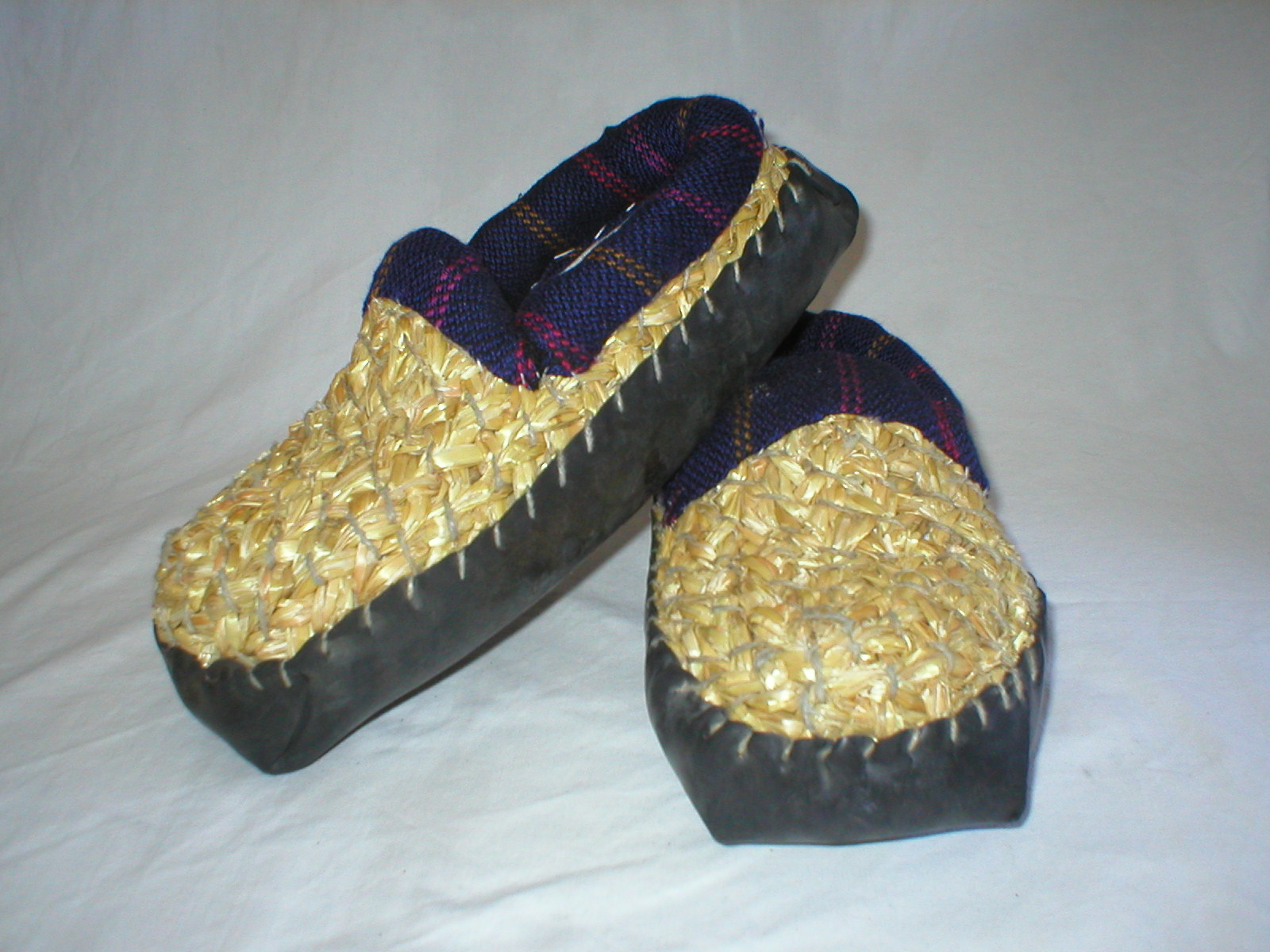 Handgefertigte Strohschuhe mit Futter und Gummisohle aus dem Schwarzwald